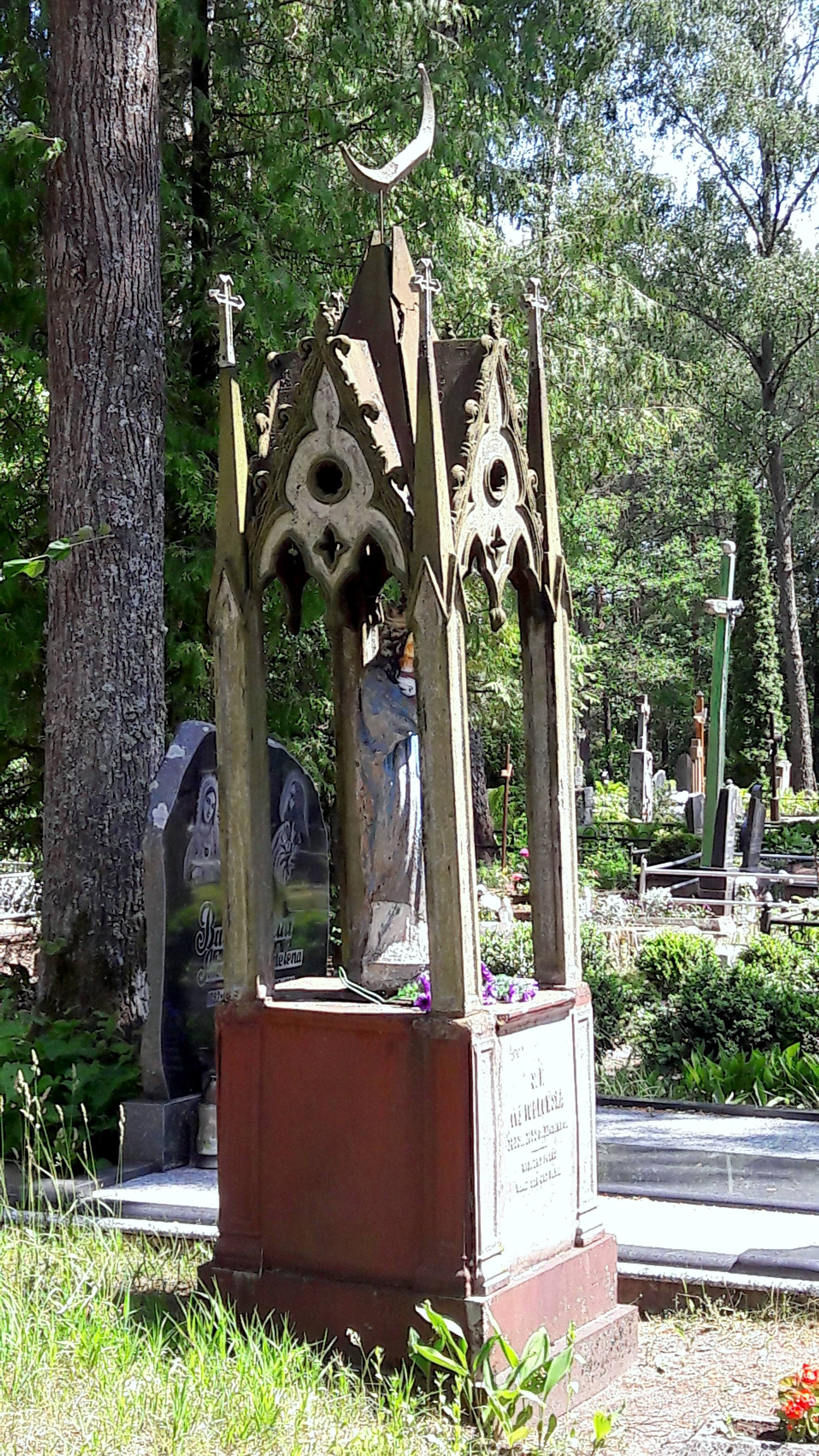 Ievos Jodkovskos antkapis Nemajūnų kapinėse